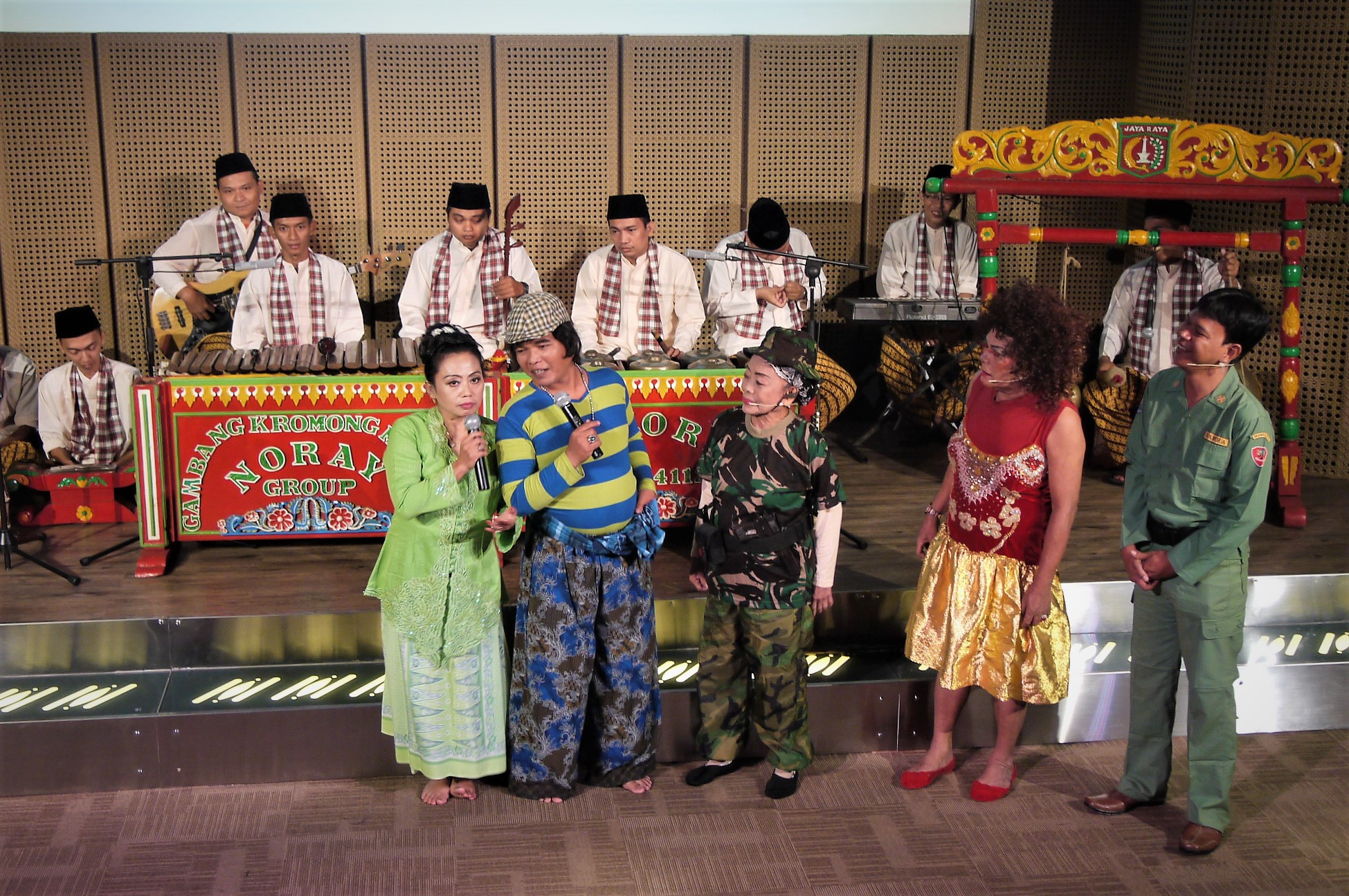 Salah satu penampilan Lenong Betawi yang semakin tergerus dengan kemajuan zaman.